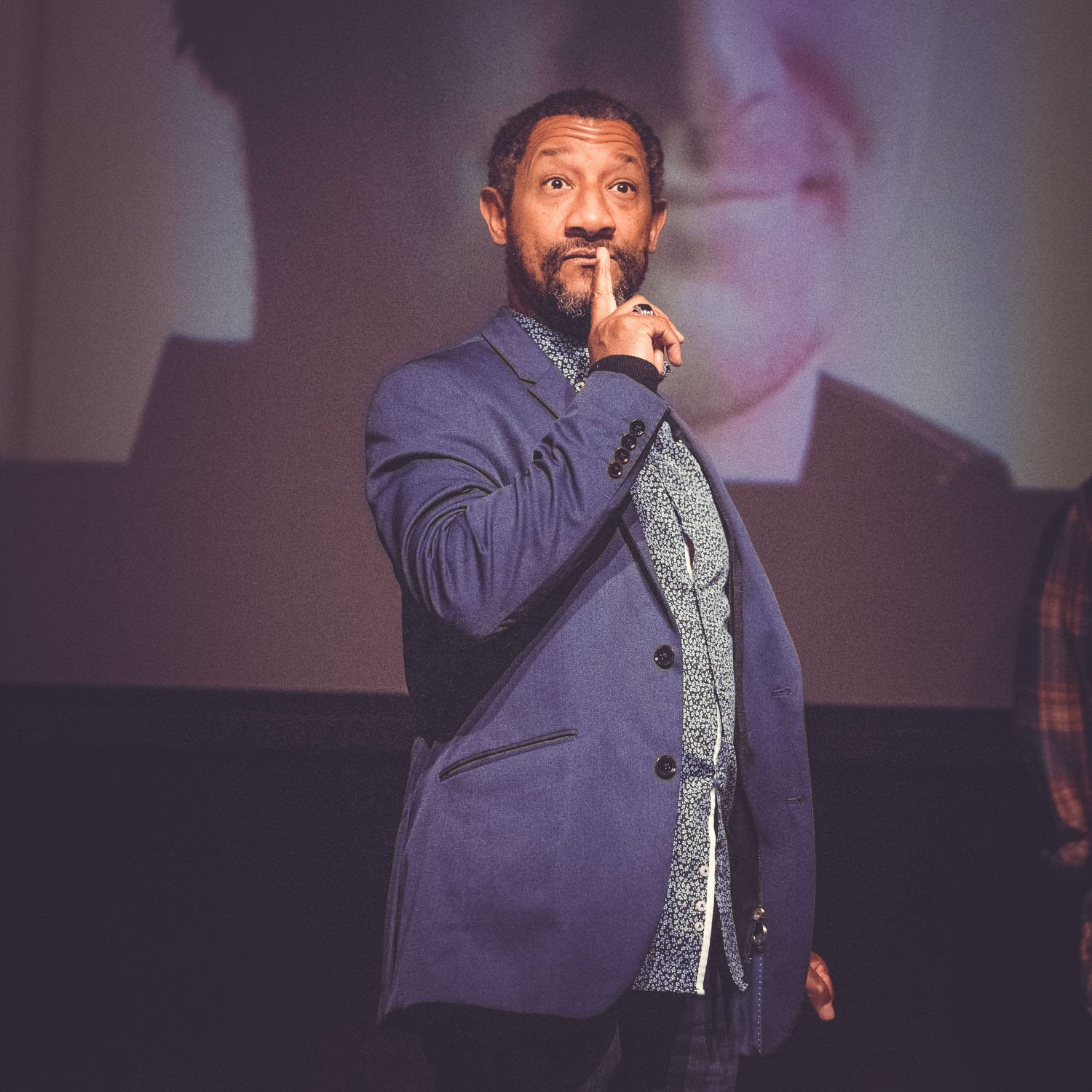 Edouard Montoute